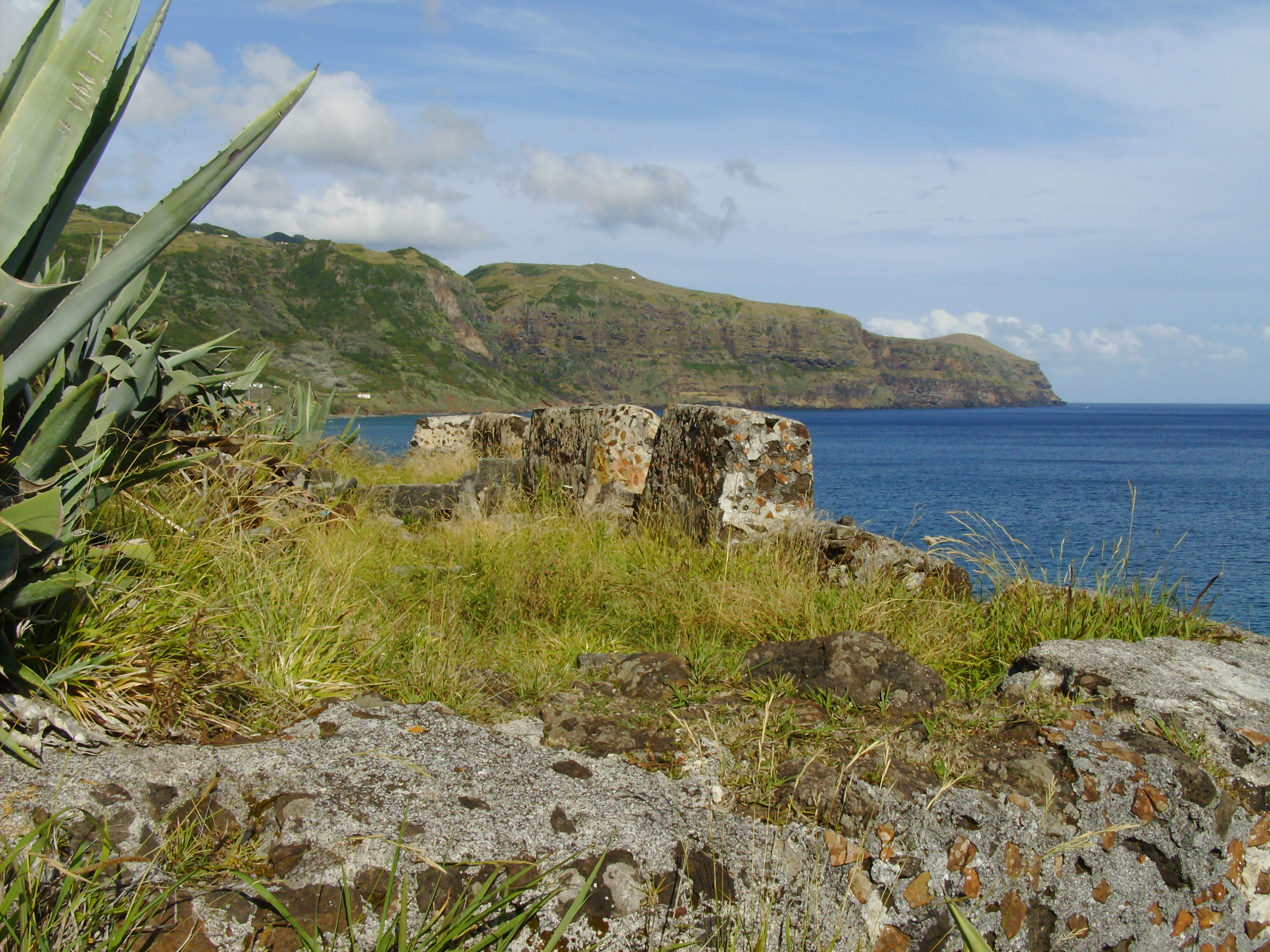 Forte da Prainha, Ilha de Santa Maria (Açores), Portugal.